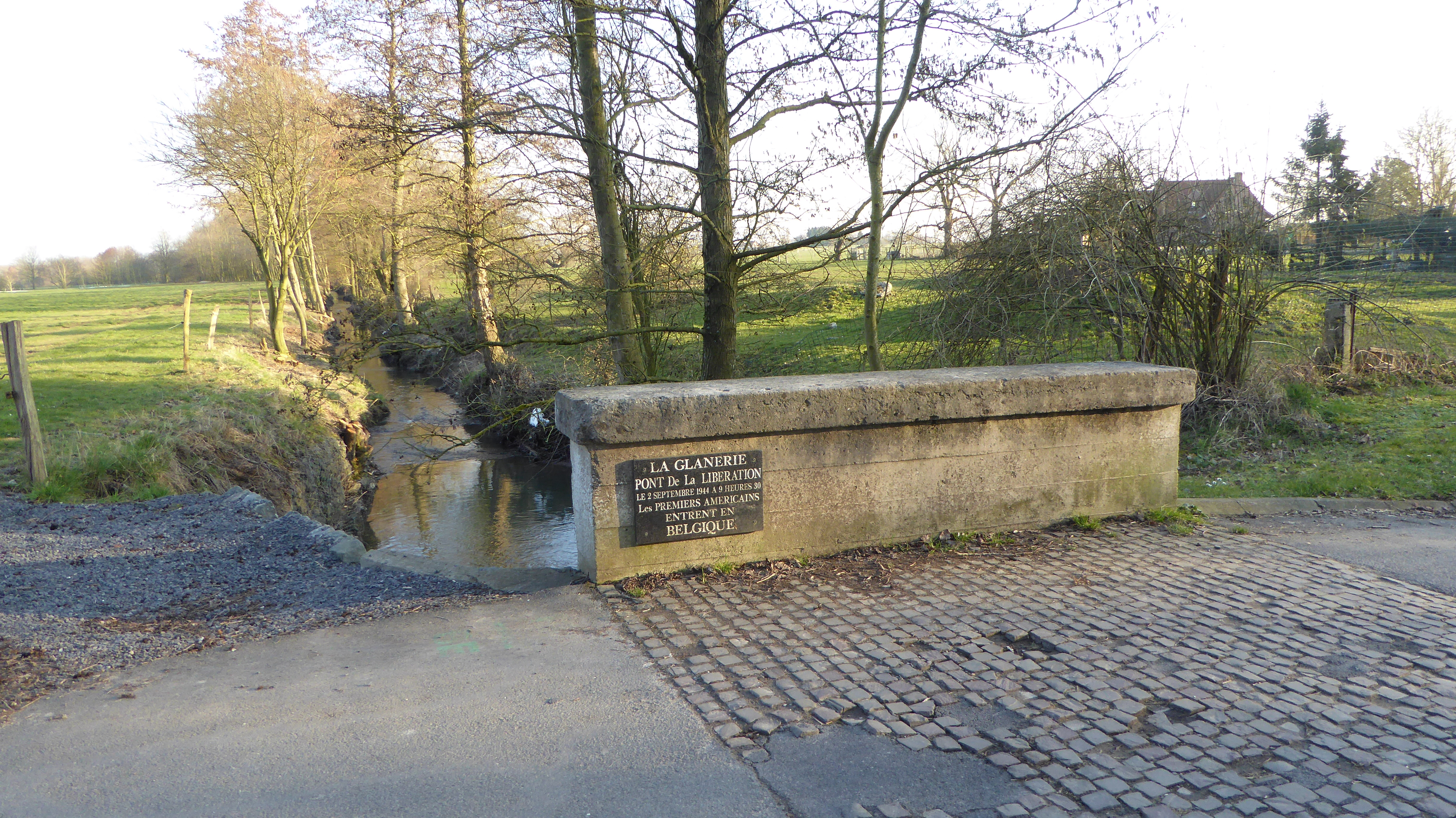 La Glanerie le pont de la Libération- Rumes, Région wallonne.- Belgique